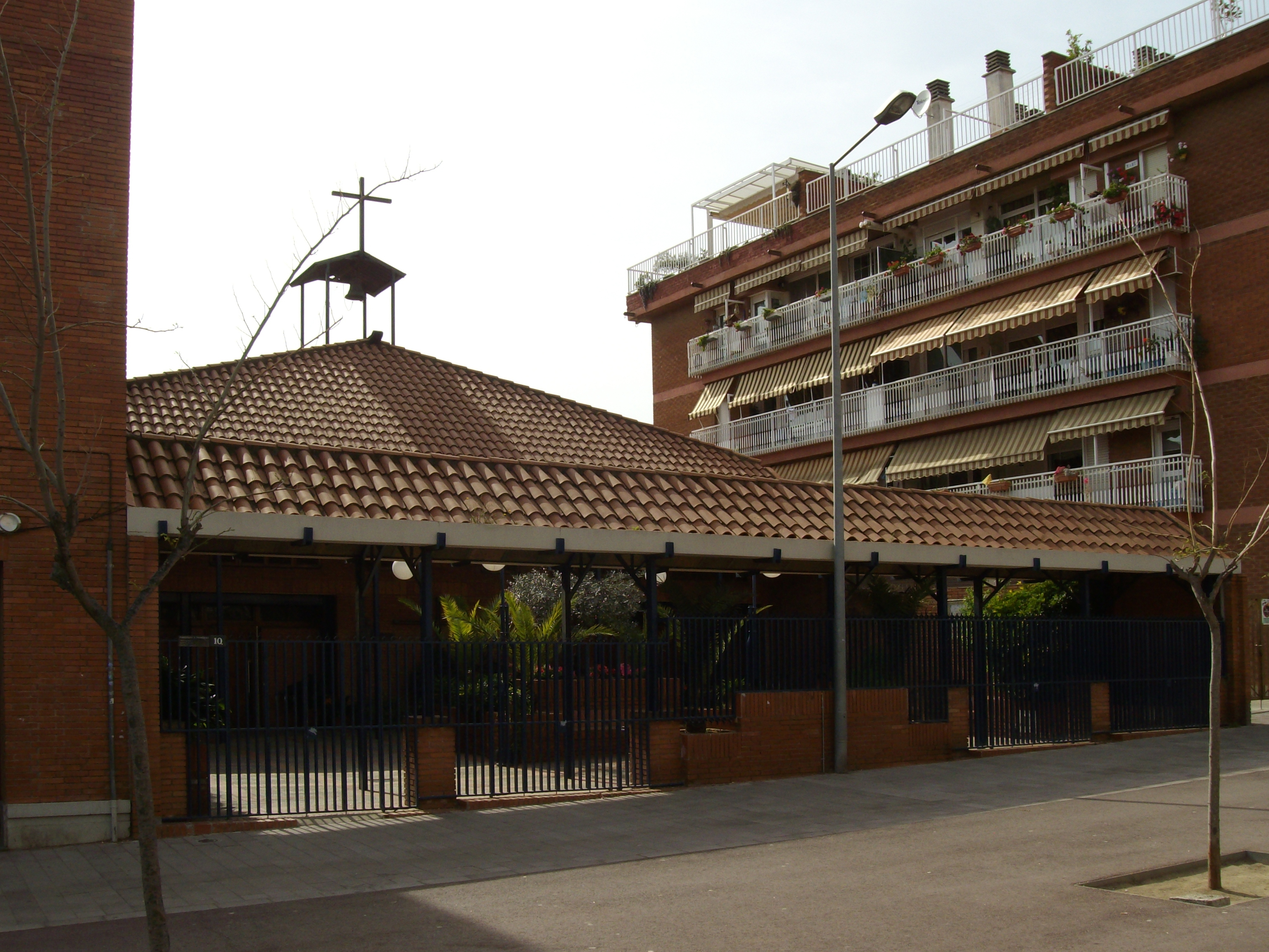 Parroquia de San Francisco de Asís (Sabadell).